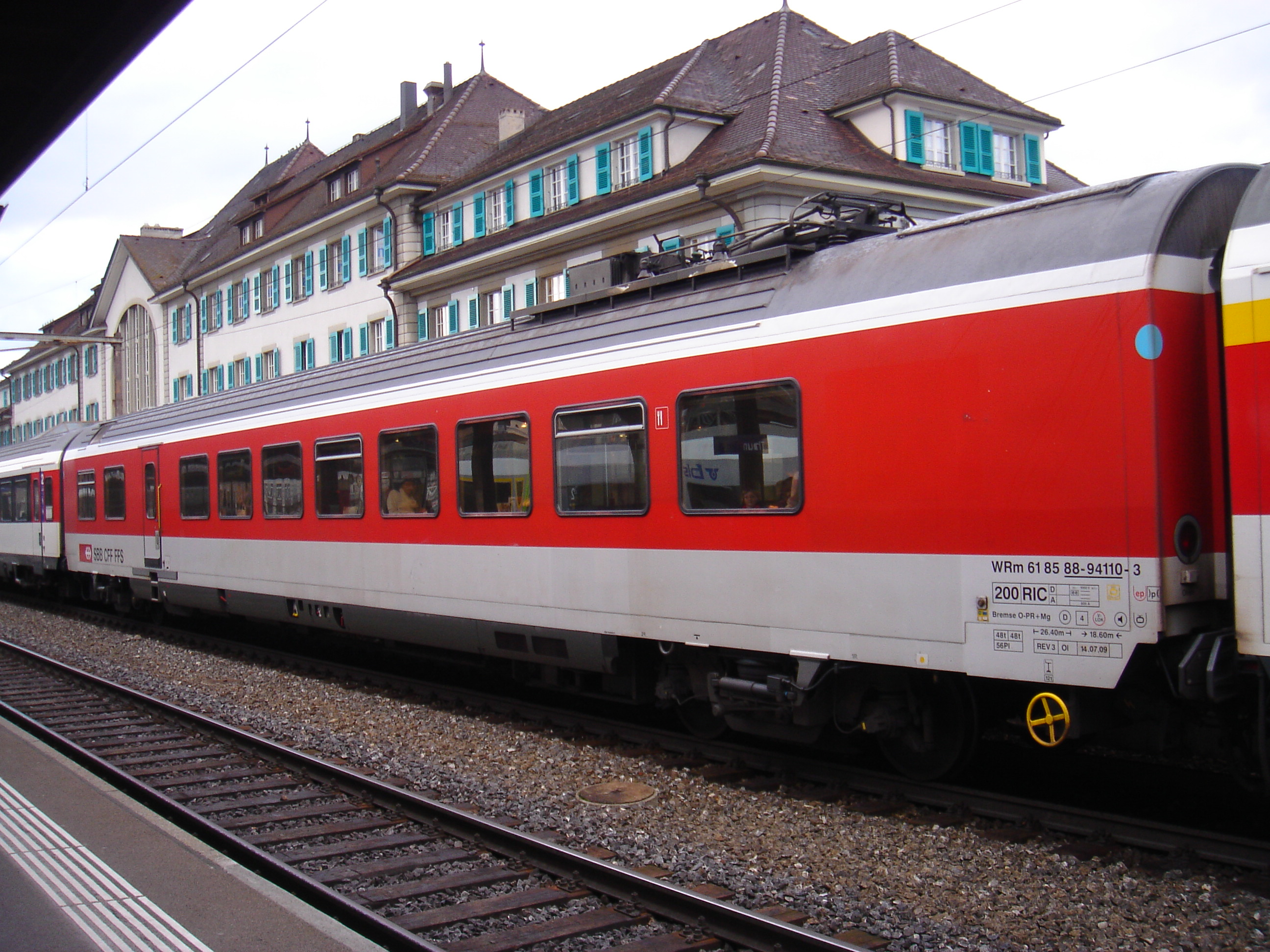 SBB Speisewagen EW IV WRm 61 85 88-94 110-3 vor der Modernisierung beim Zwischenhalt in Thun